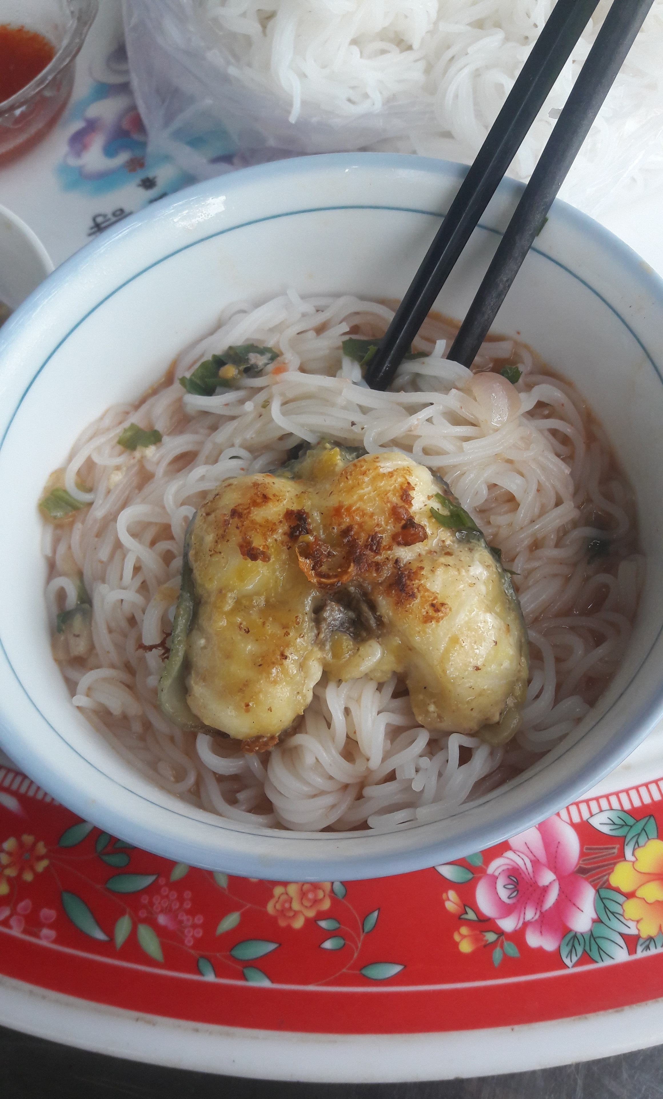 Hình tự chụp bằng máy di động cá nhân (đã cắt lại cho gọn) về một tô bún cá thu ở Đông Hà